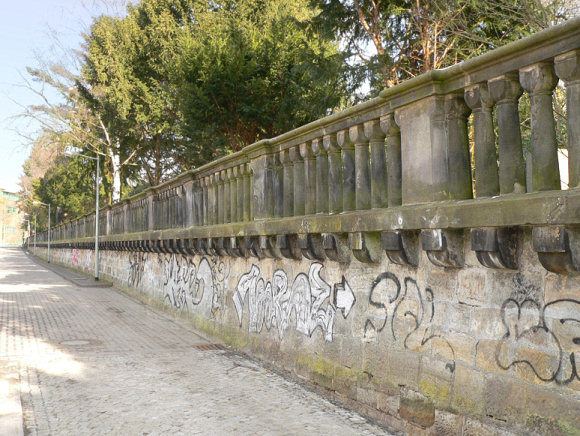 Früheres Geländer des Schiffgrabens am Stadtfriedhof Engesohde